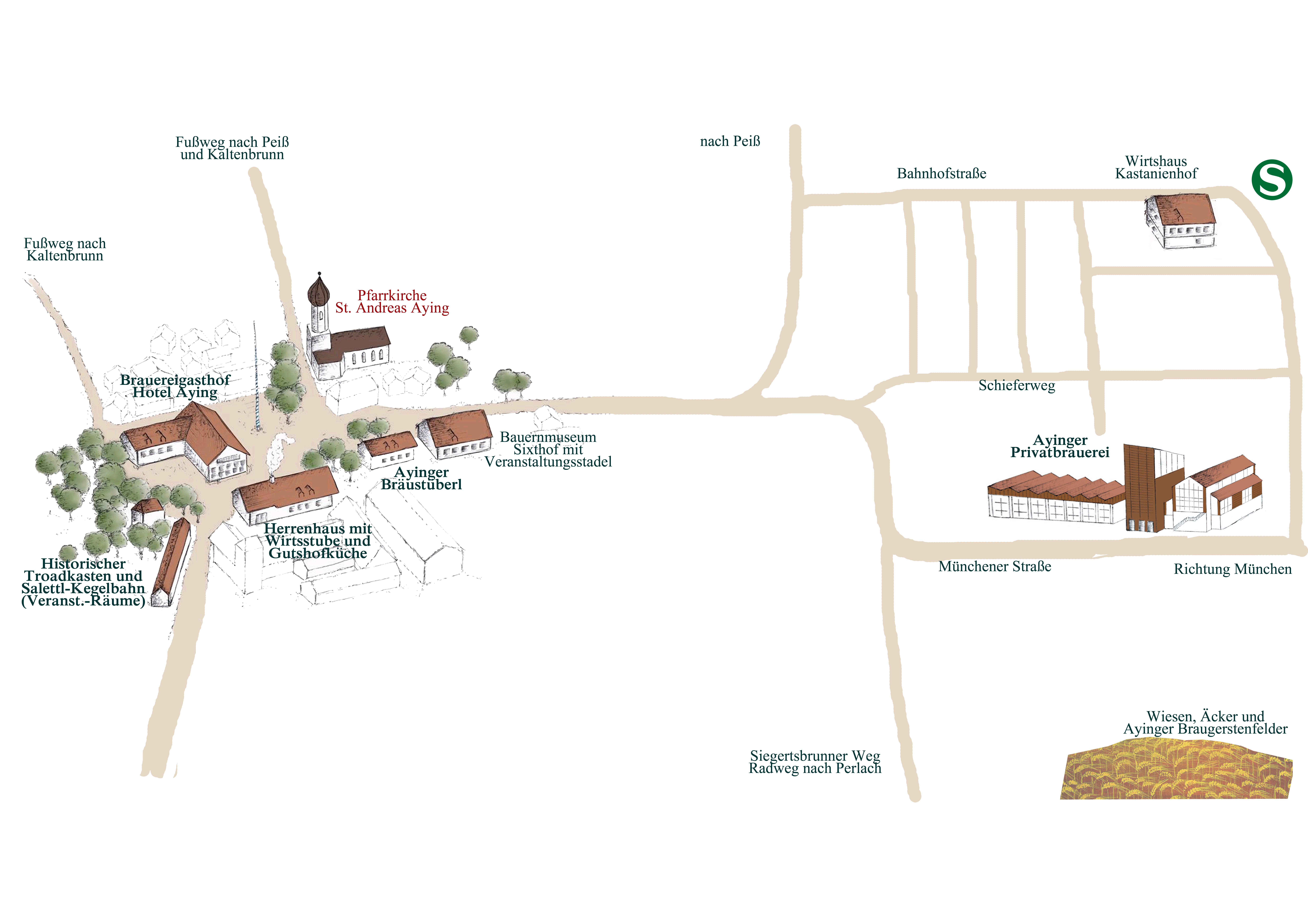 Übersicht über das Dorf Aying mit Brauerei, Brauereigasthof und Bäustüberl